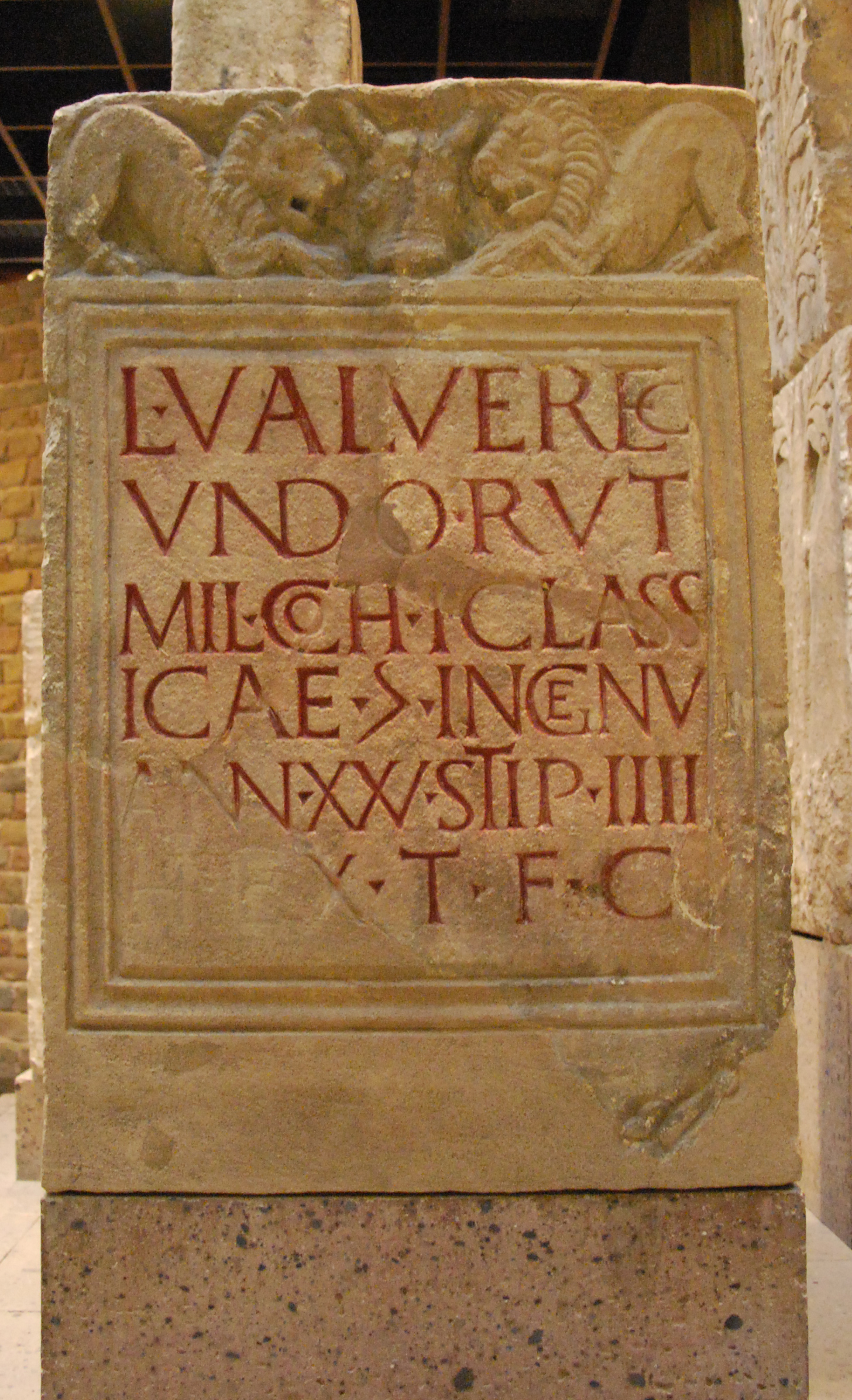 Grabstein des L. Valerius Verecundus, Flottenlager Köln-Alteburg; Römisch-Germanisches Museum Köln; CIL XIII 12061